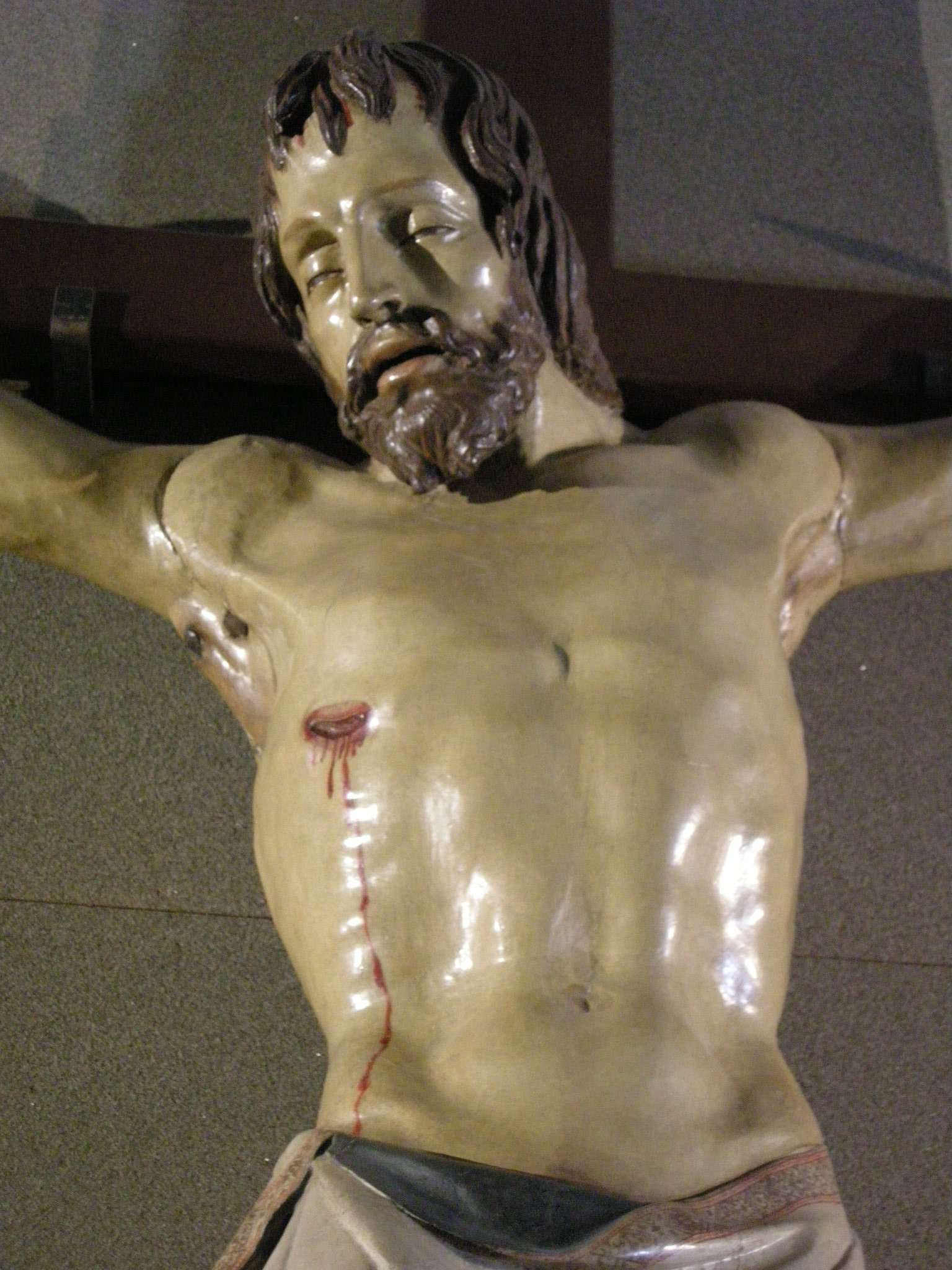 Crocifisso di donatello, 1406-08